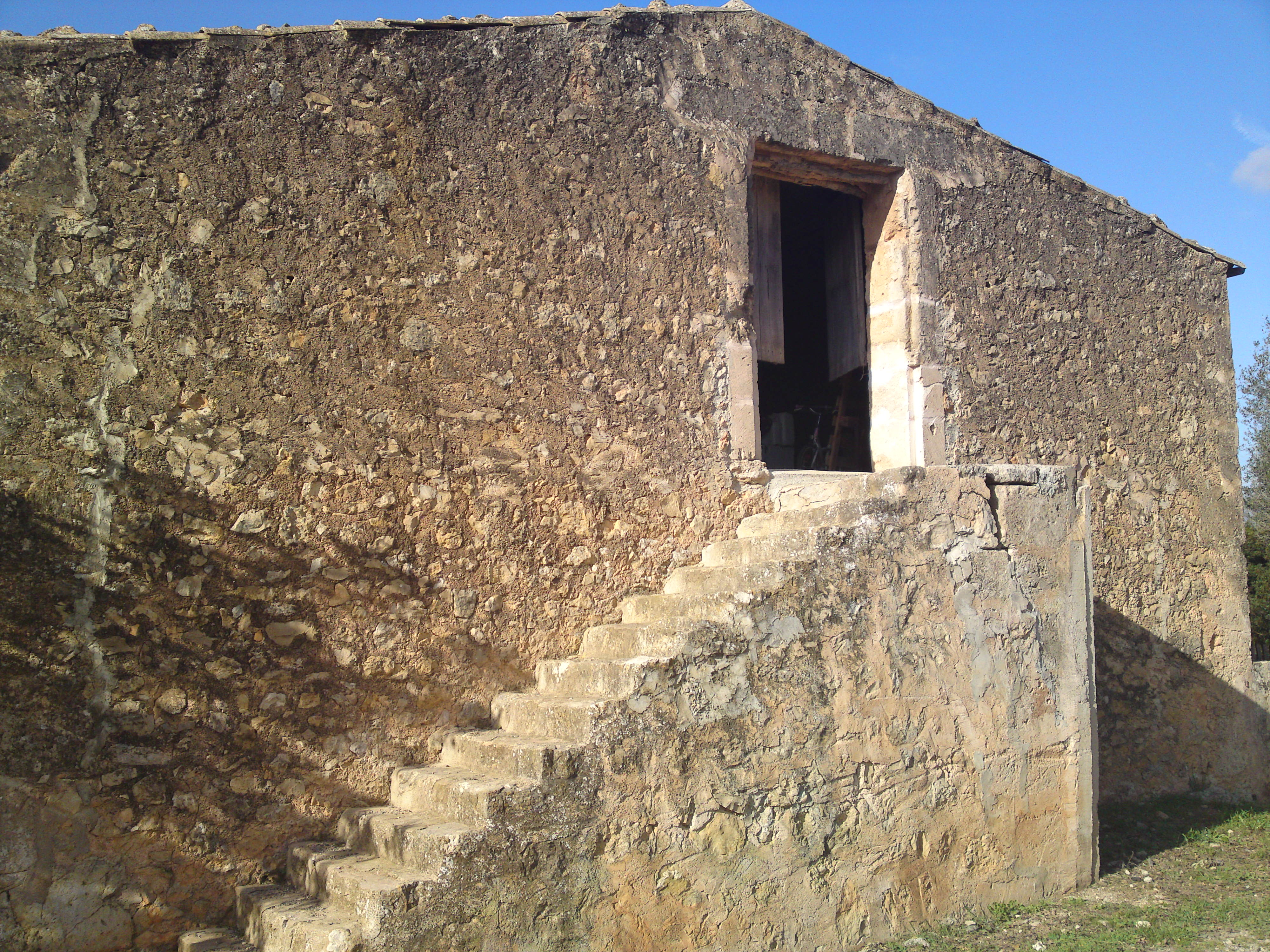 Detall de les cases de la possessió de Son Roig (Algaida)